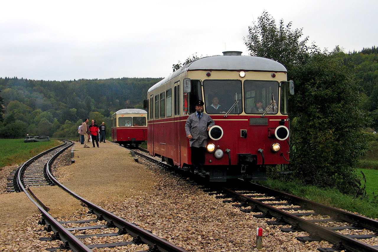 T 33 beim Umsetzen im Bahnhof Sägmühle, im Hintergrund TA 101.